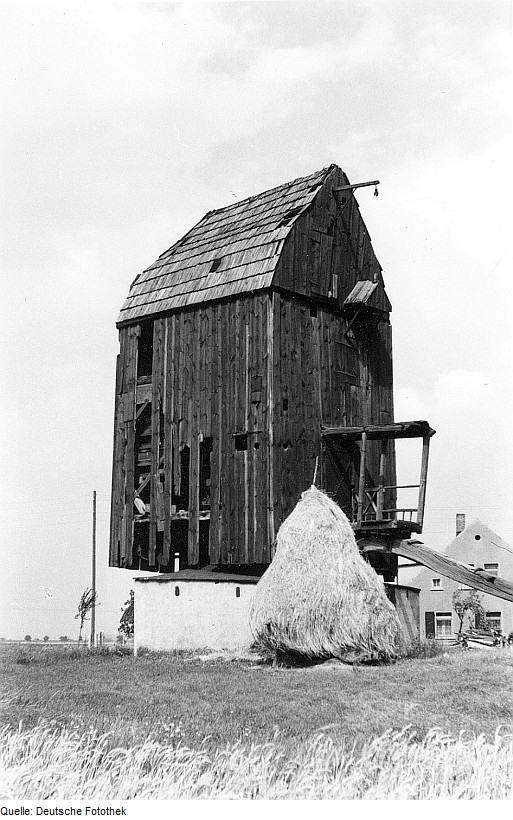 Original image description from the Deutsche Fotothek Wanzleben-Schleibnitz. Bockmühle, 19. Jh.